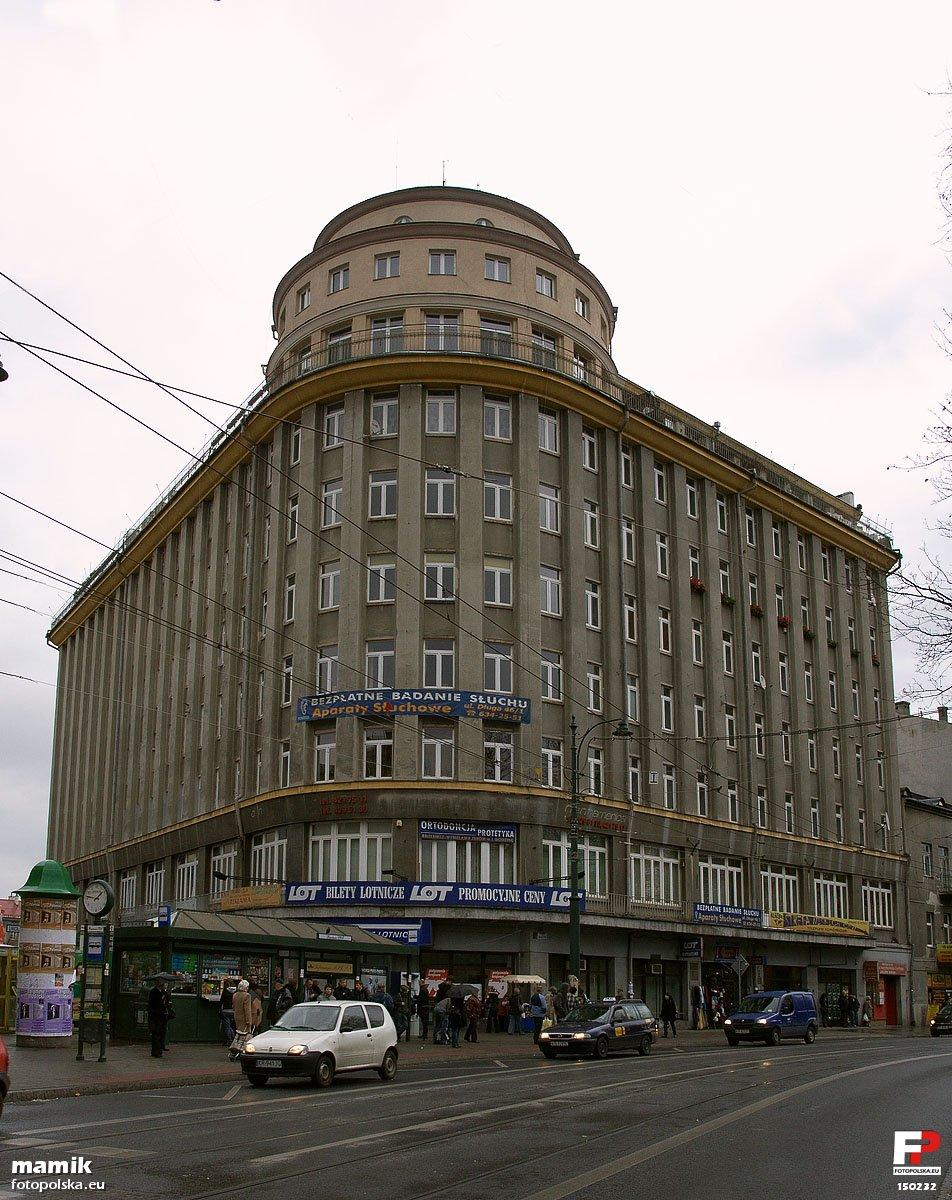 Gmach Feniksa, jeden z najcenniejszych przykładów krakowskiego modernizmu